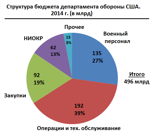 Оборонный бюджет США за 2014 г.